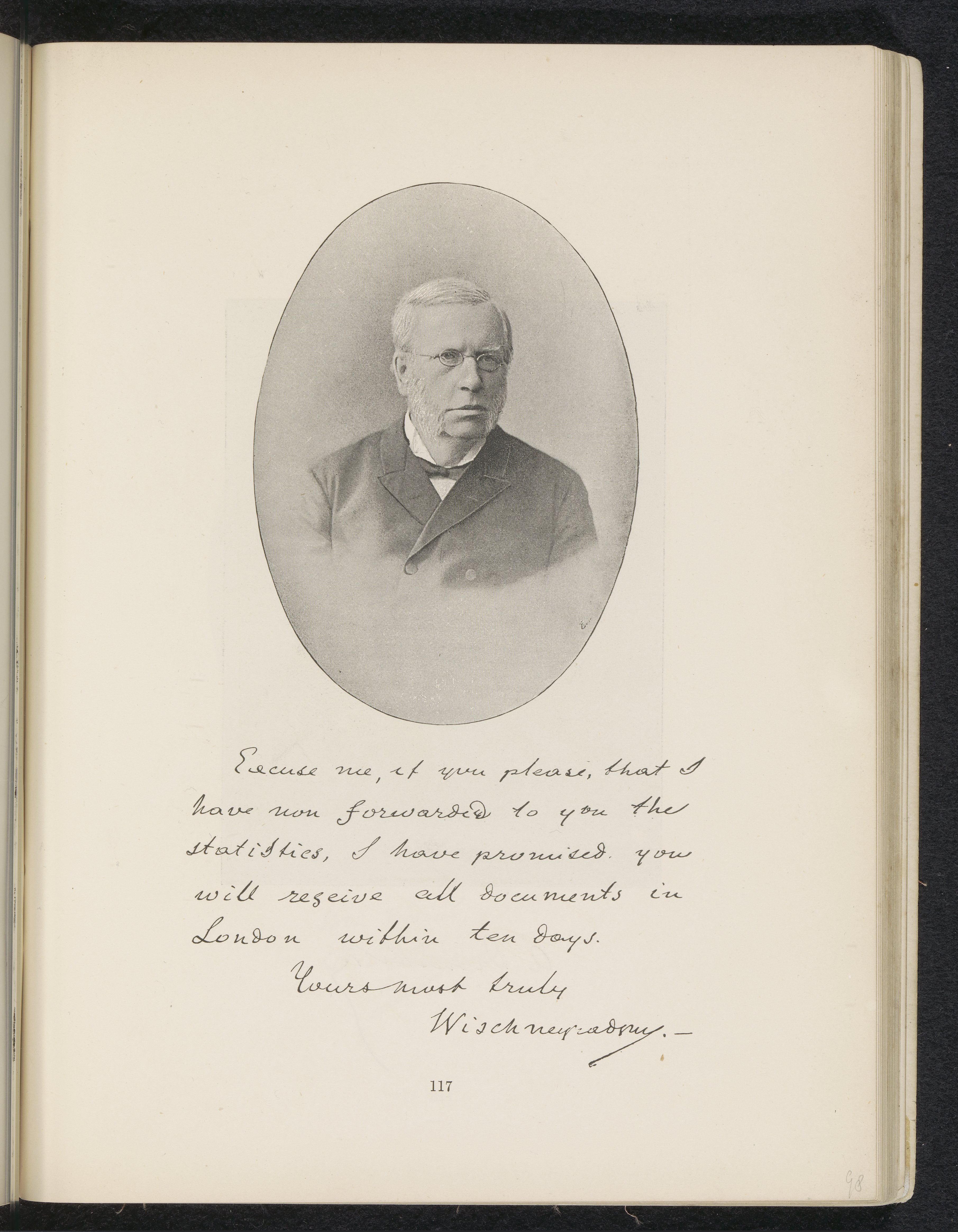 IdentificatieTitel(s): Portret van Ivan VyshnegradskyObjecttype: fotomechanische afdruk bladzijde Objectnummer: RP-F-2001-7-67-98Opschriften / Merken: opschrift, recto, gedrukt: tekst in het handschrift van de geportretteerdeVervaardigingVervaardiger: vervaardiger: anoniemDatering: ca. 1881 - in of voor 1891Materiaal: papier Techniek: autotypieAfmetingen: prent: h 117 mm × b 82 mmOnderwerpWat: politician, e.g. party leaderWie: Ivan VyshnegradskyVerwerving en rechtenCredit line: Aankoop met steun van de Mondriaan Stichting, het Prins Bernhard Cultuurfonds, het VSBfonds, het Paul Huf Fonds/Rijksmuseum Fonds en het Egbert KunstfondsVerwerving: aankoop 2001Copyright: Publiek domein